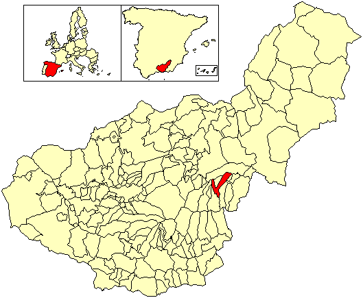 Situación del término municipal de La Calahorra respecto a la provincia de Granada, en España.